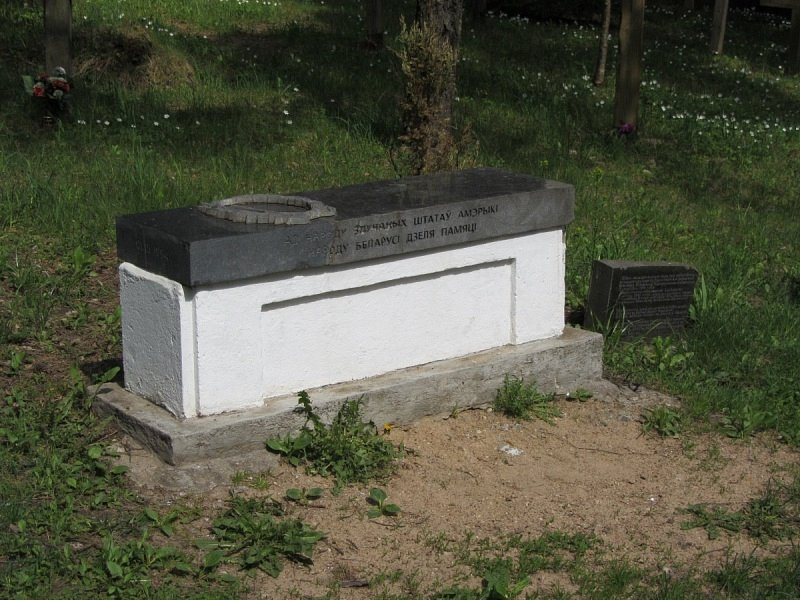 Мінск. Курапаты